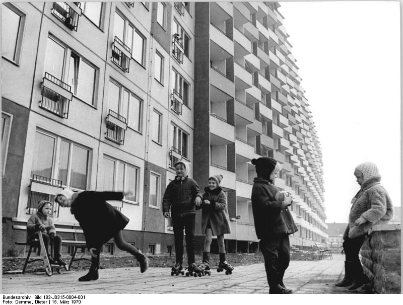 Erfurt, Johannisplatz, Neubauten, Wohnblocks Zentralbild Demme 15.3.70 Erfurt: Rollschuhlaufen und die ersten Ballspiele sind nach langen Wintermonaten wohl mit die ersten Anzeichen des kommenden Frühlings. Beobachtet vor den Neubauten am Johannisplatz in Erfurt. Auf Vorschlag der Regierung der DDR treffen am 19.3.70 in Erfurt der Vorsitzende des Ministerrates der DDR, Willi Stoph, und der Bundeskanzler der Bundesrepublik, Willy Brandt zusammen.